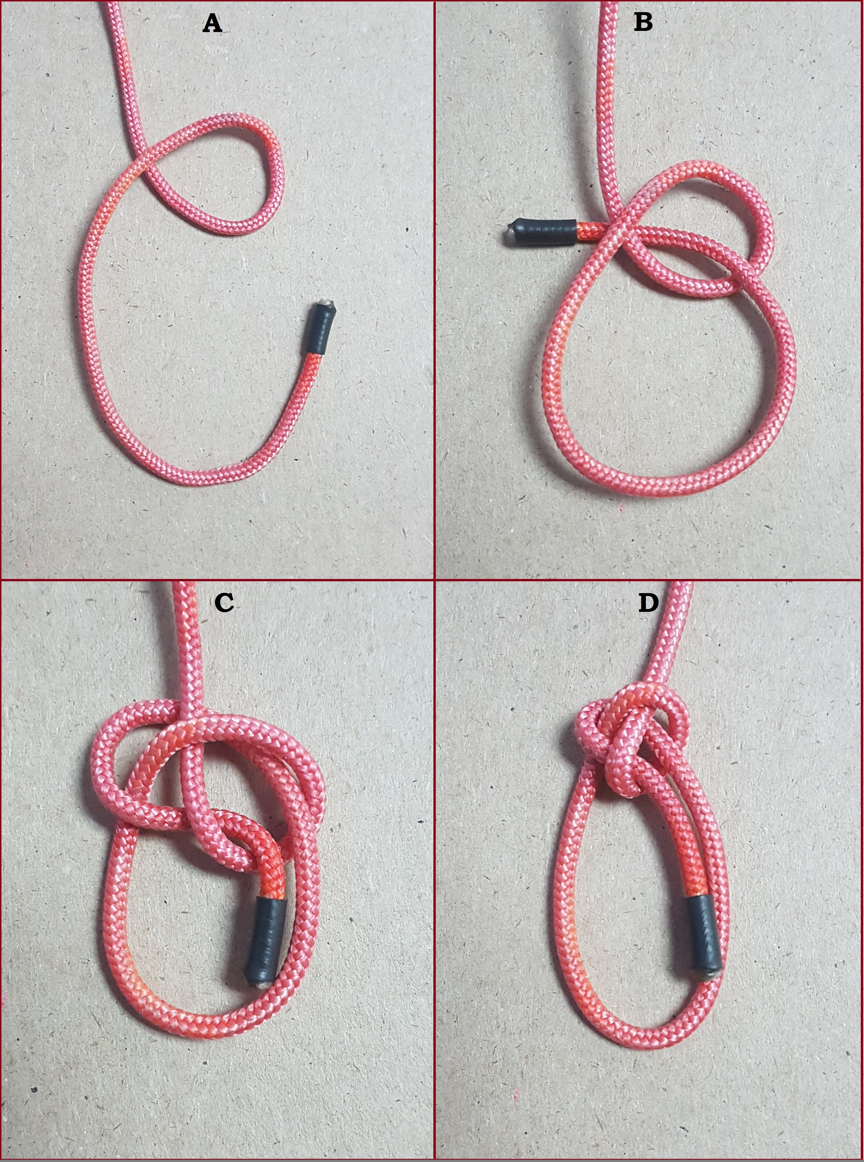 Metode om die Eskimo Boeglynknoop te knoop.